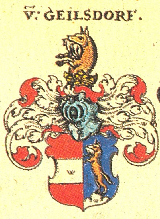 Wappen der fränkischen Adelsfamilie von Geilsdorf.